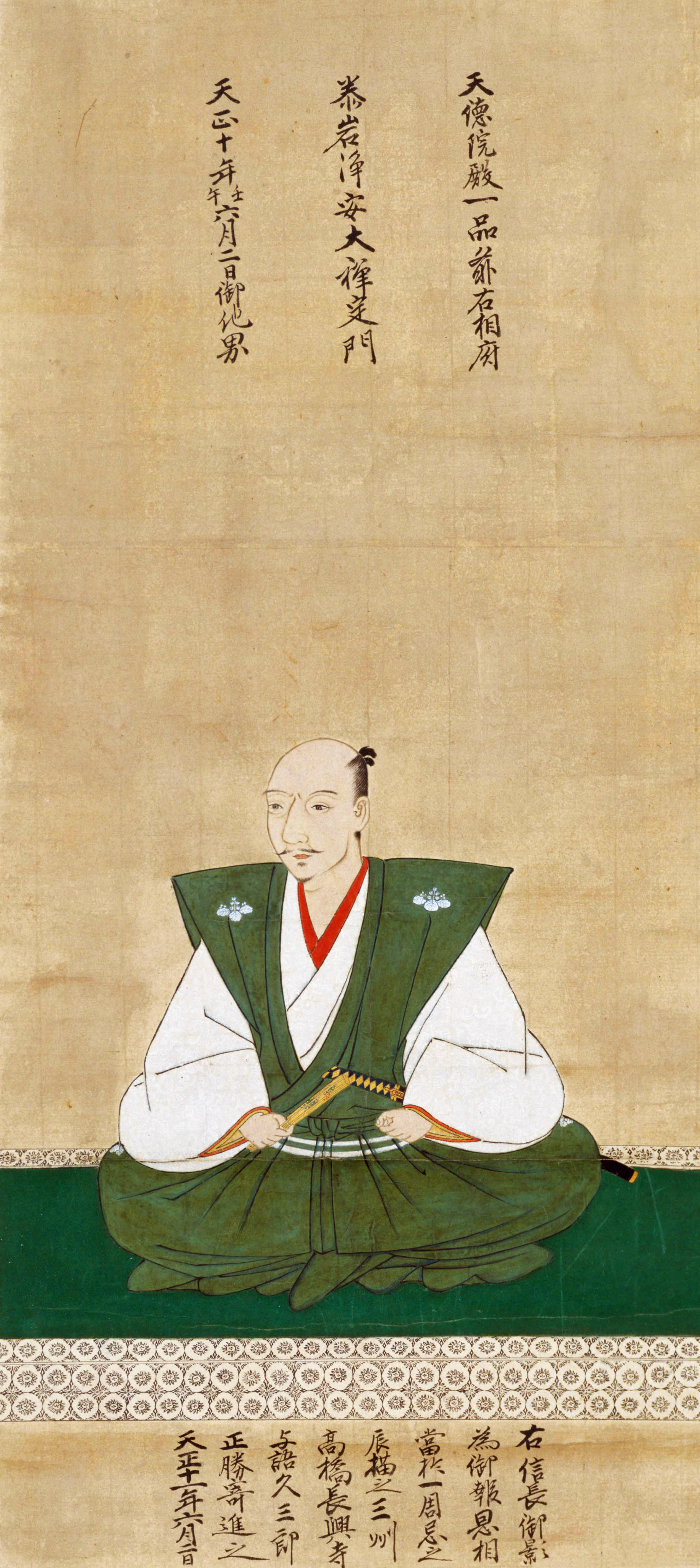 織田信長像 賛・跋。原本は愛知県西加茂郡挙母町長興寺所蔵。 天徳院殿一品前右相府 泰岩浄安大禅定門 天正十年壬午六月二日御他界 右信長御影 為御報恩相 當於一周忌之 辰描之三州 高橋長興寺 与語久三郎 正勝寄進之 天正十一年六月二日